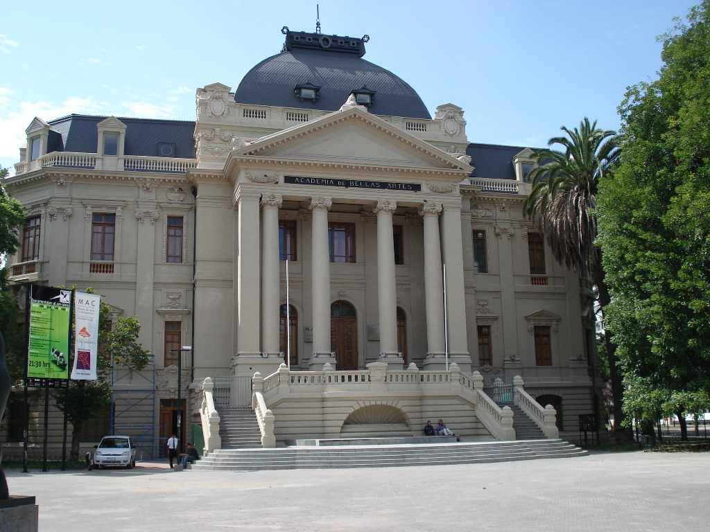 Vista del Museo de Arte Contemporáneo de la ciudad de Santiago de Chile.